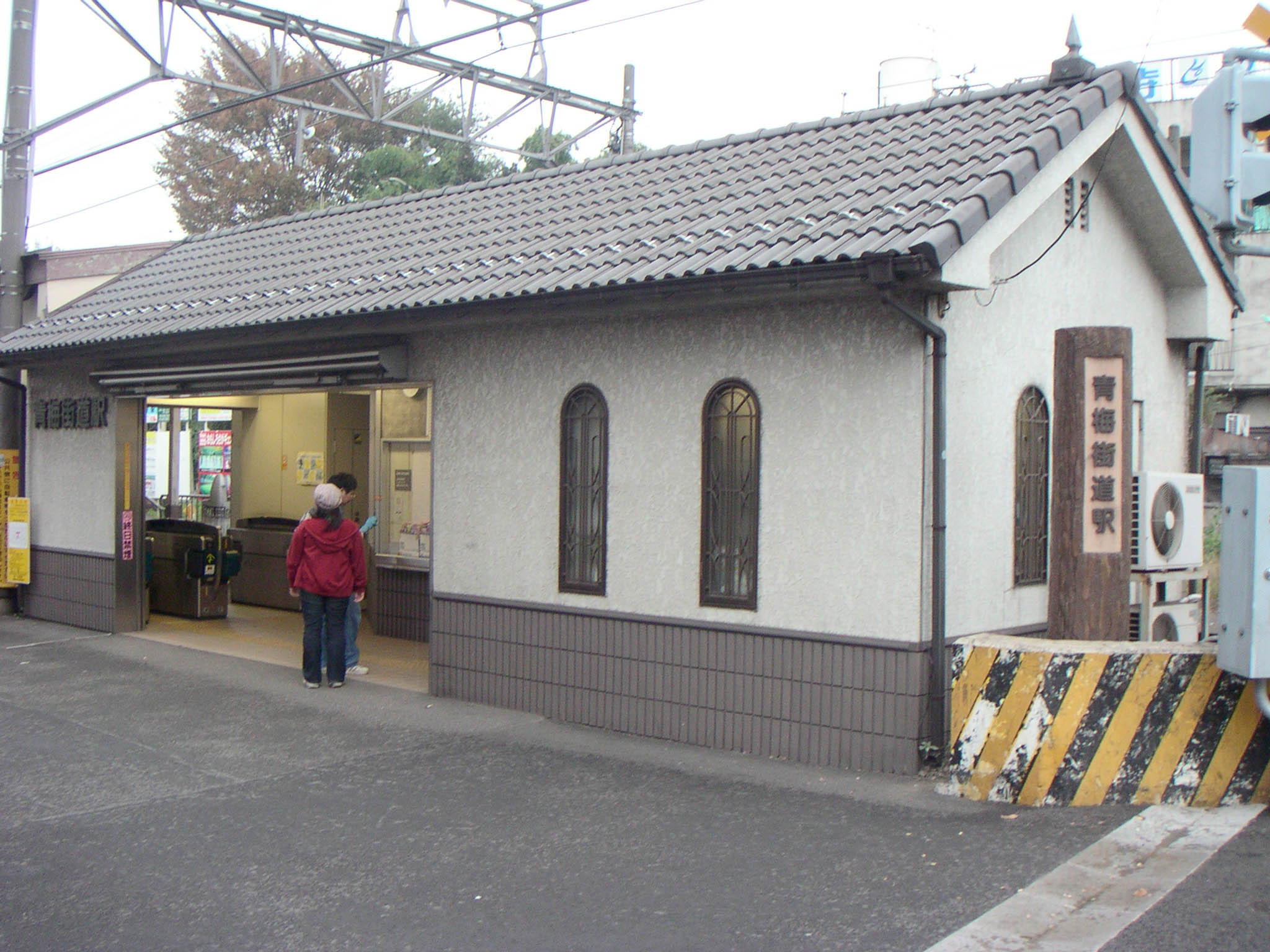 Omekaido Station, Tokyo, Japan